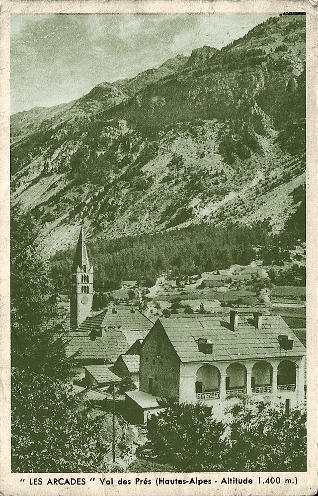 Maison des Arcades au Val-des-Prés dans les Hautes-Alpes